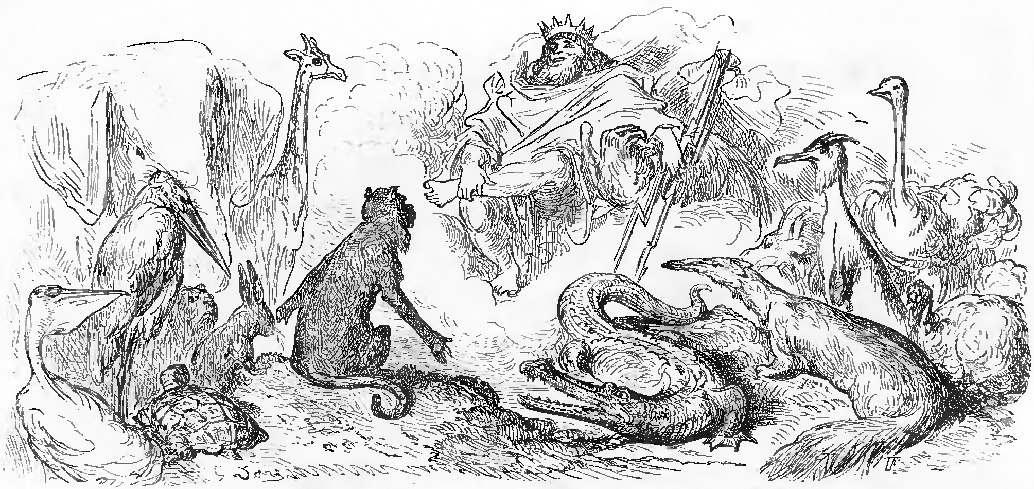 grafika z książki PL Bajki, Jean de La Fontaine, nakładem i drukiem Jana Noskowskiego, Warszawa 1876